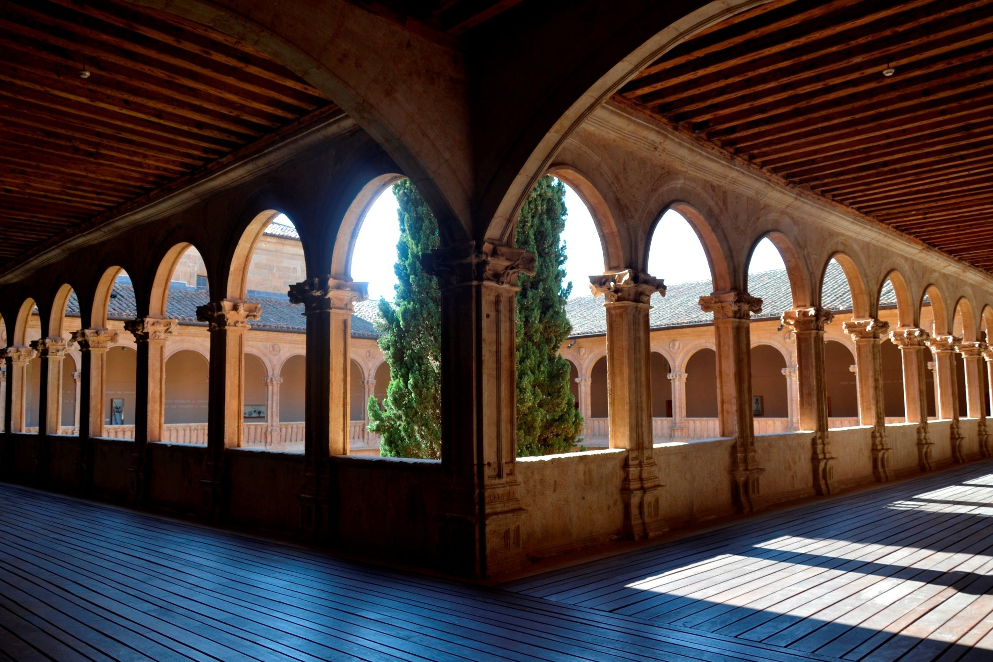 Stephen.